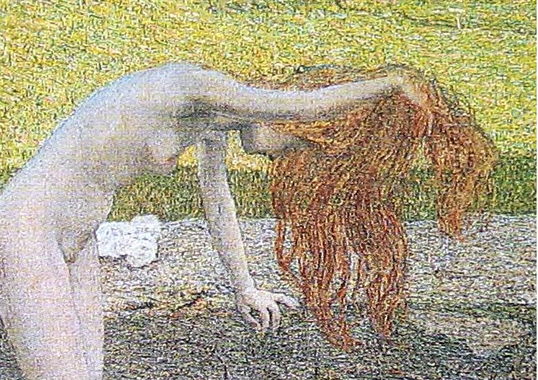 detail